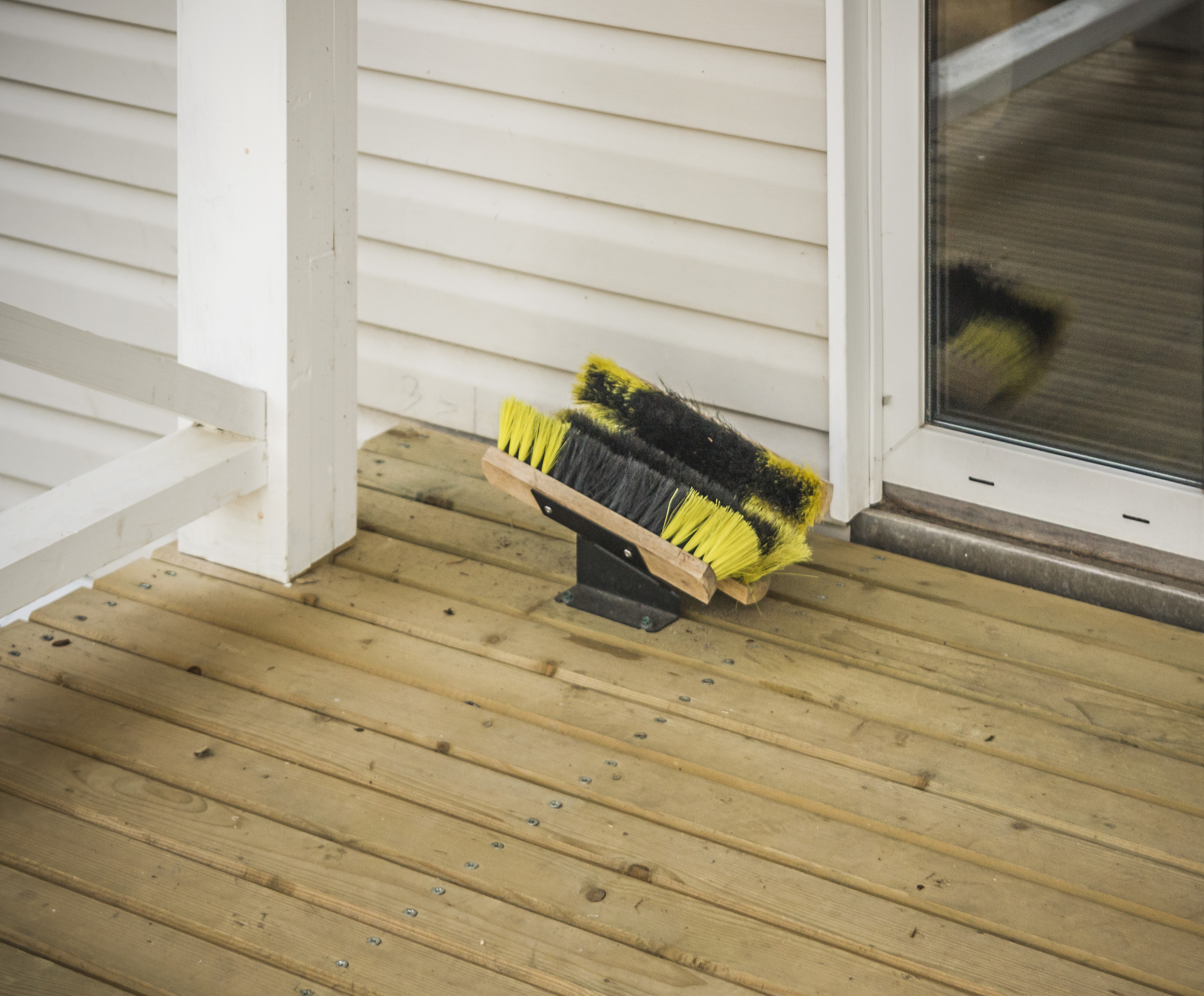 Современный декроттуар из трех шваберных щеток в гостинице "Старая Слобода"